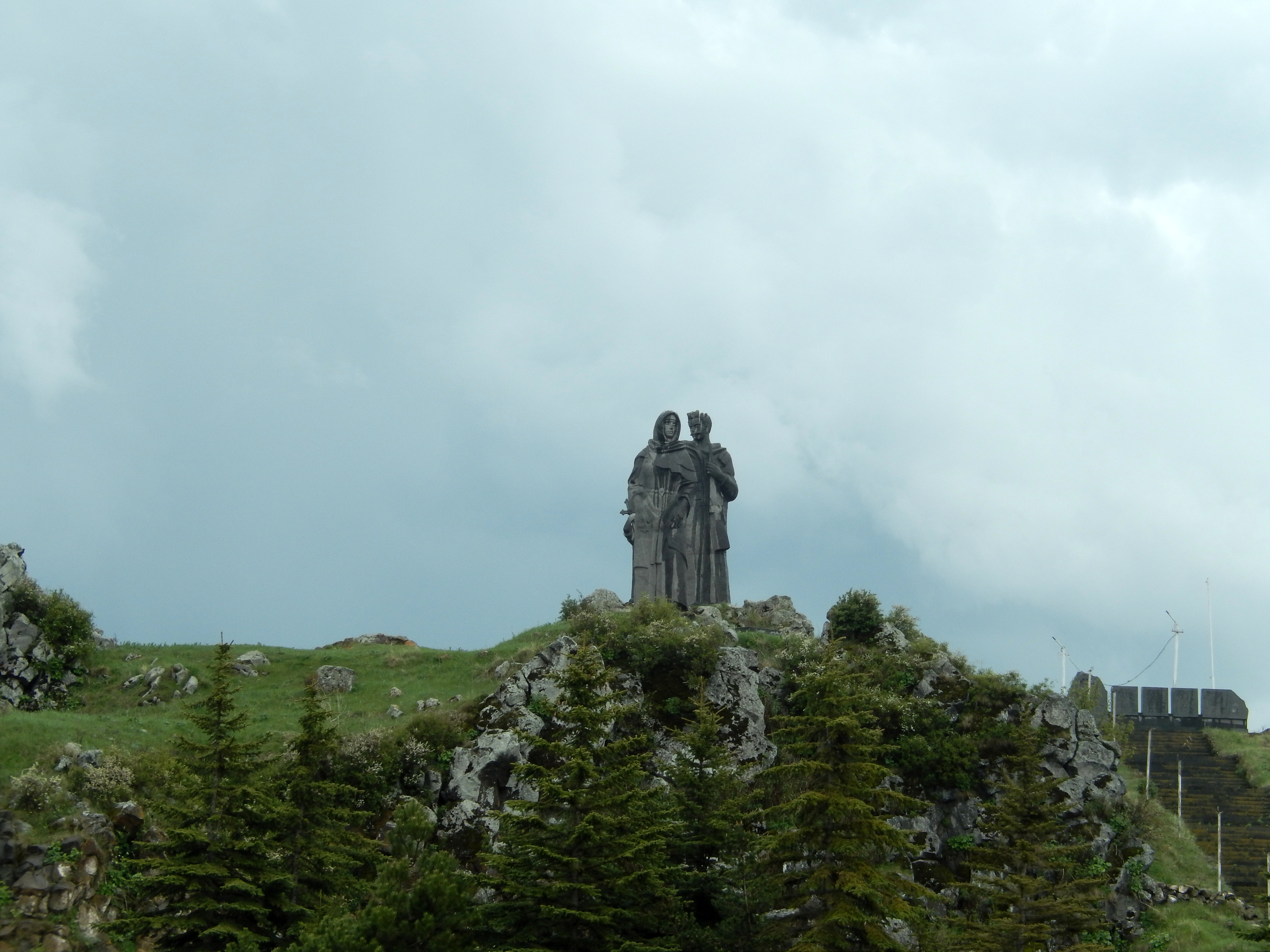 Խաչ և սուր, Ծովազարդ 50/2.1.1